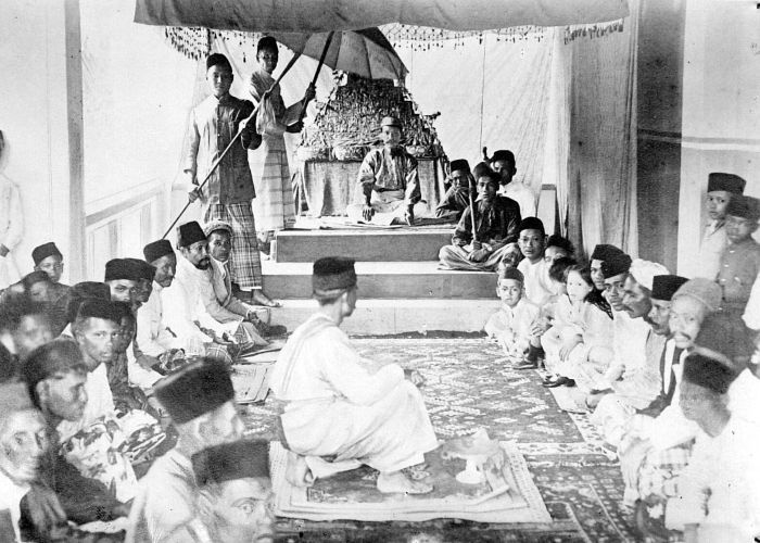 Repronegatief. De zelfbestuurder van Panei in zijn paleis, Asahan, Noordoost-Sumatra